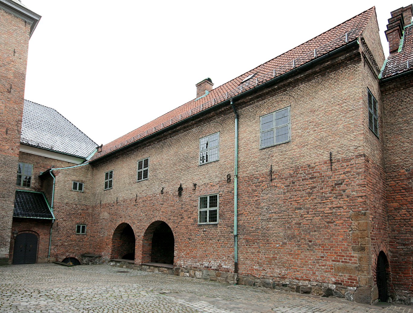 Skriverstuehuset, Akershus festning, Oslo. Eldste murer (utvendig) fra 1300-tallet; ombygd 1560.